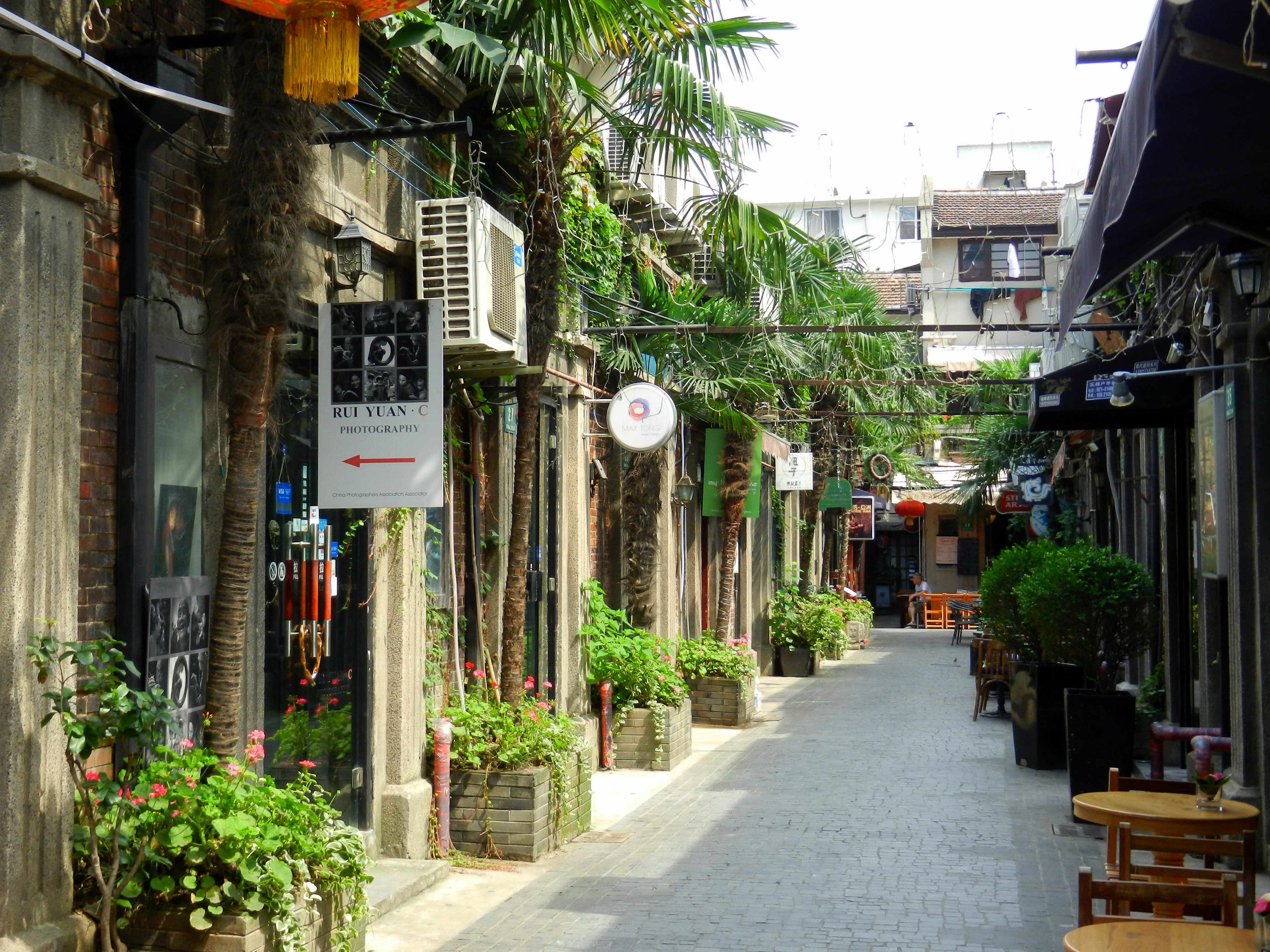 Shanghai Tianzifang 上海田子坊